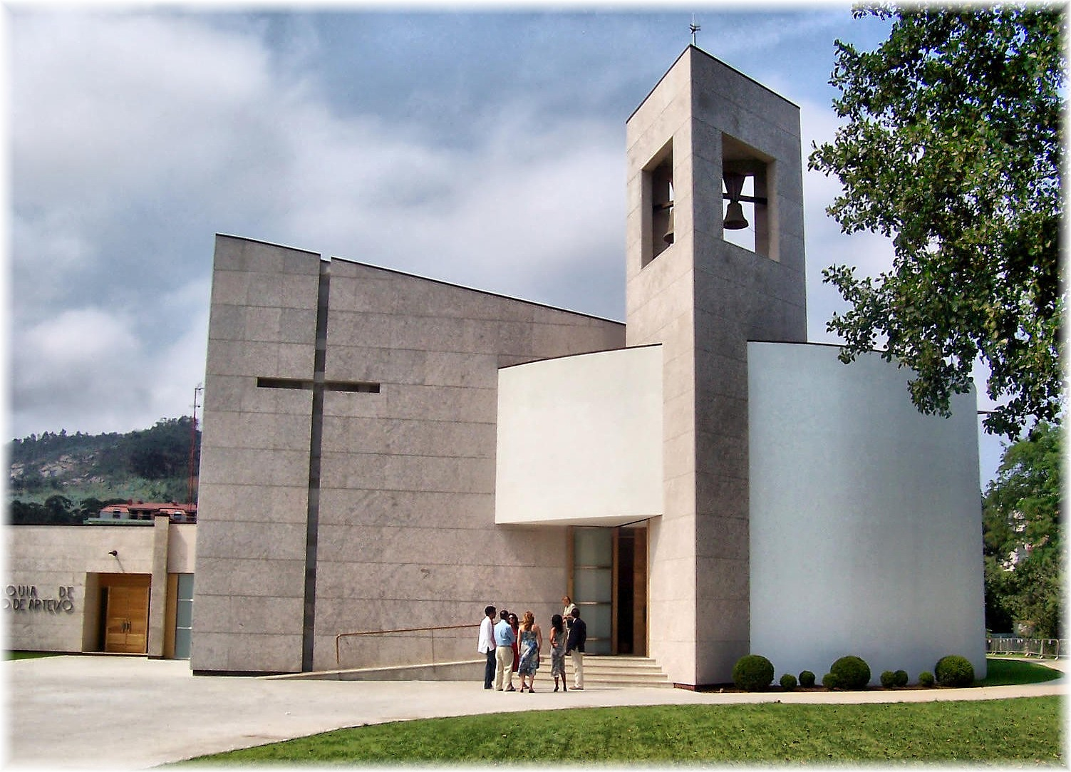 1933-Nova igrexa de Arteixo